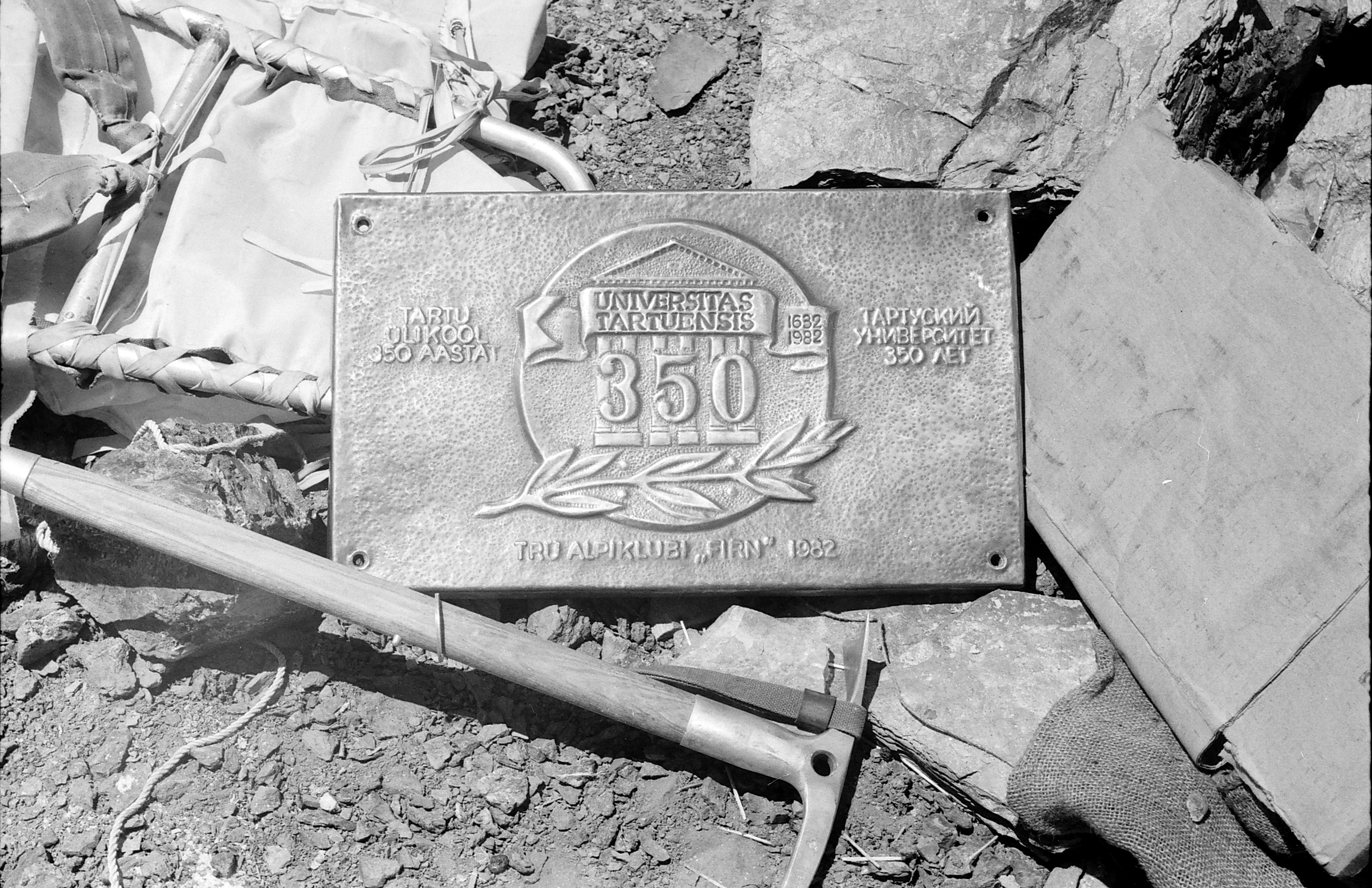 Ekspeditsioon mäetipule "Tartu Ülikool 350".